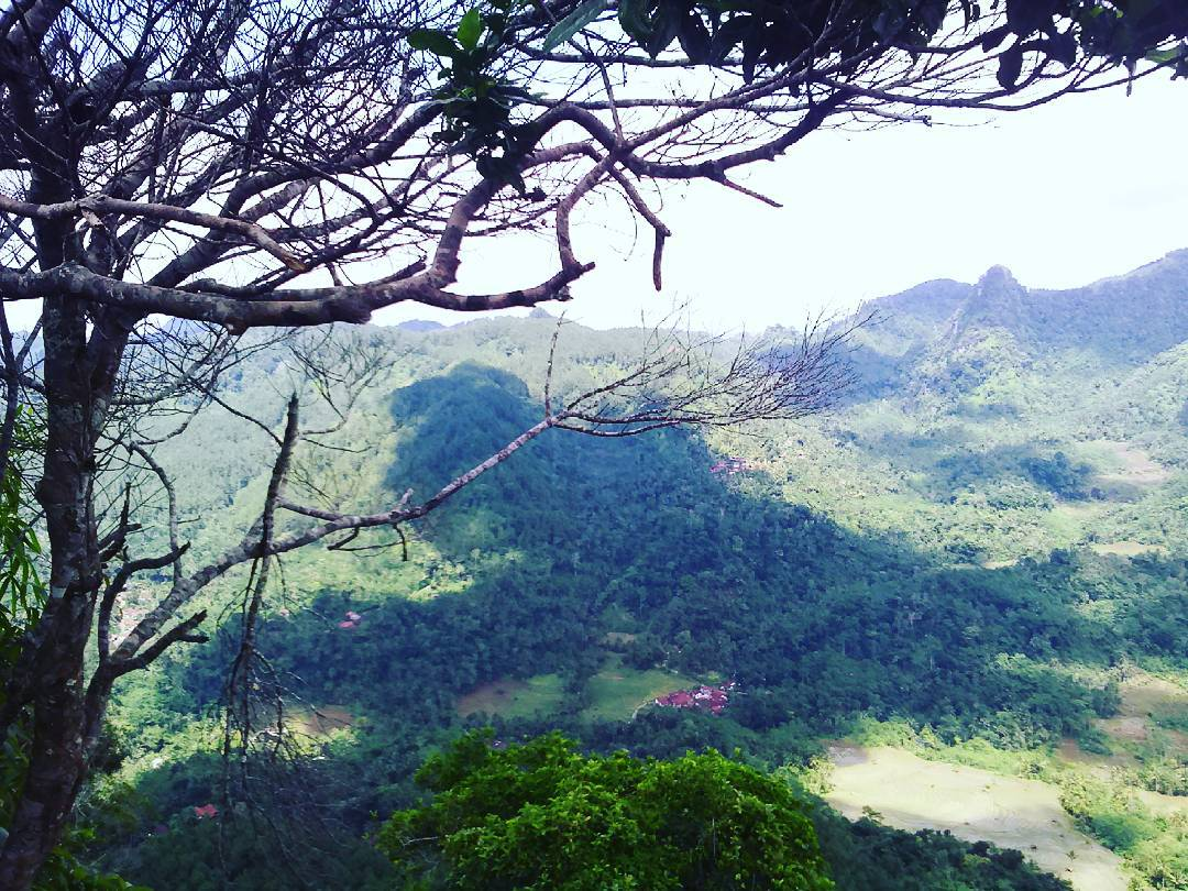 Gunung Saliala